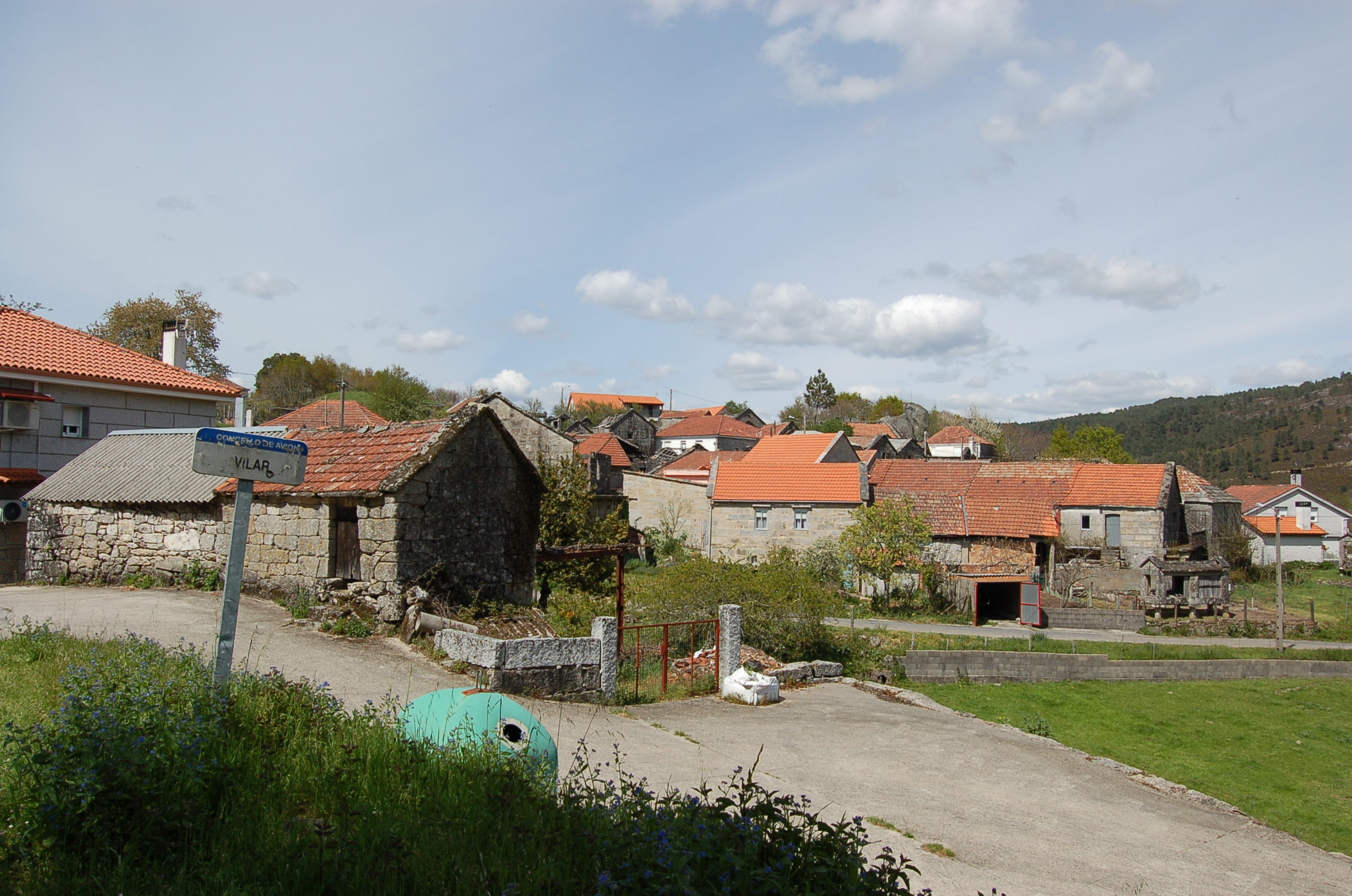 Vista da aldea de Vilar, na parroquia de Barroso, no concello de Avión